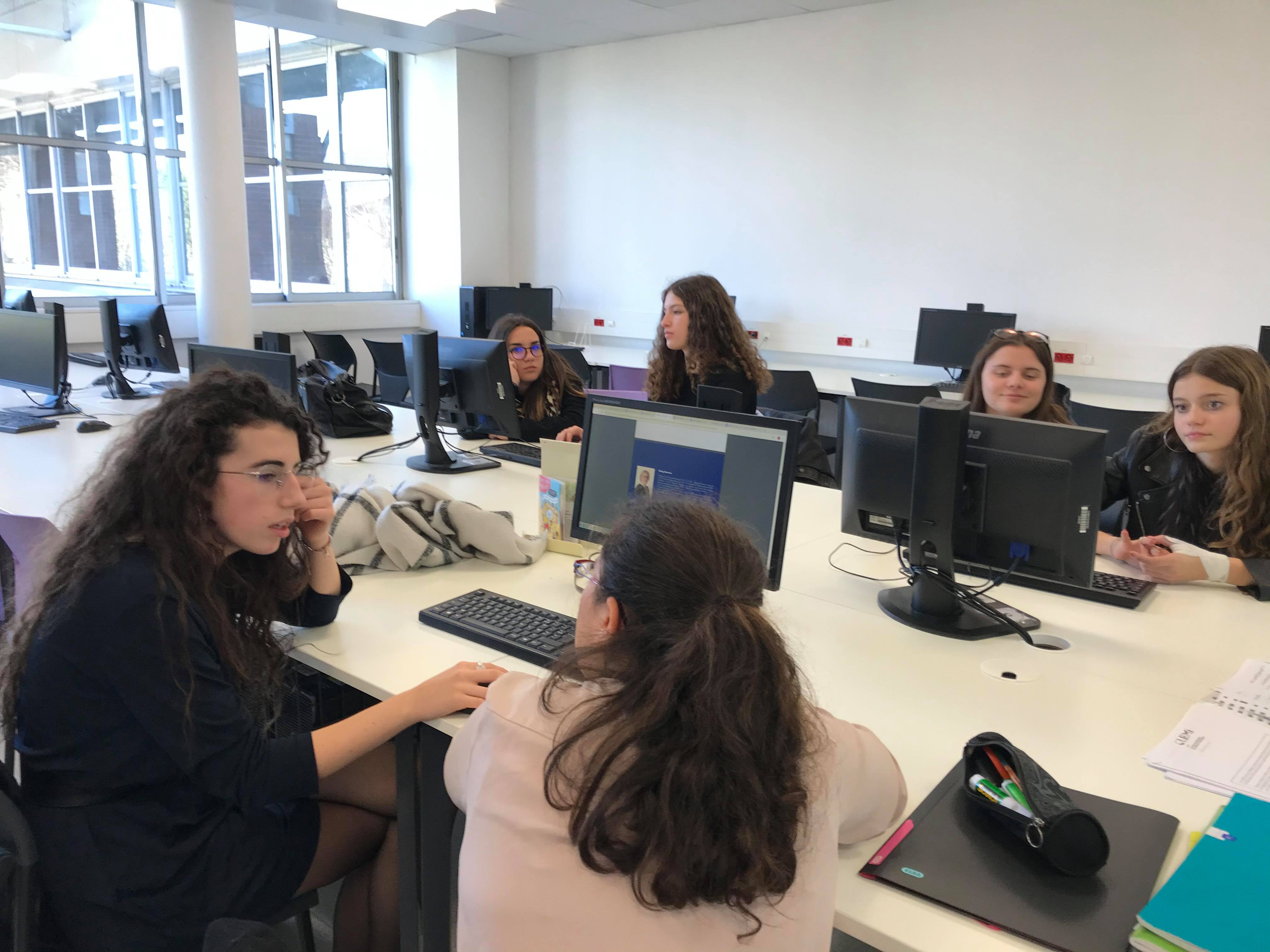 Article sur Edwige Bonnevie